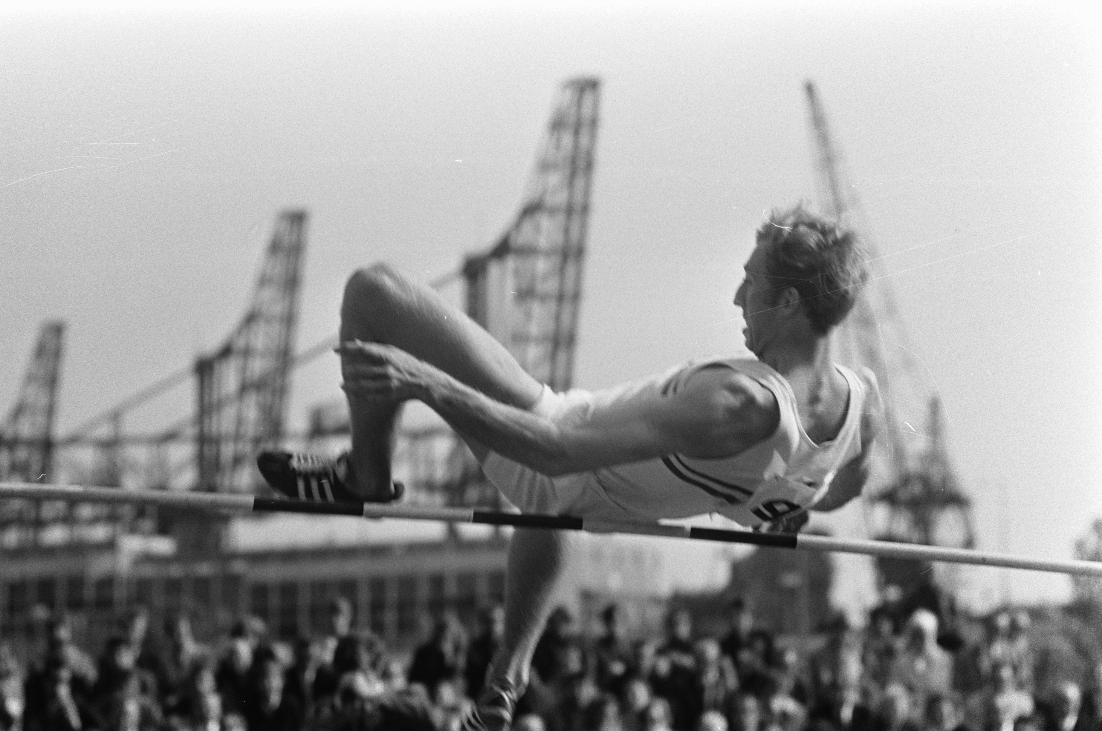 Collectie / Archief : Fotocollectie Anefo Reportage / Serie : [ onbekend ] Beschrijving : Dames atletiek vijfkamp en Heren tienkamp Nederland, Belgie Groot Brittannie te Vlaardingen 16A , 17A: Hemmery 18A : Noorlander Datum : 7 juni 1969 Locatie : Vlaardingen, Zuid-Holland Trefwoorden : ATLETIEK Persoonsnaam : Hemmery Fotograaf : Mieremet, Rob / Anefo Auteursrechthebbende : Nationaal Archief Materiaalsoort : Negatief (zwart/wit) Nummer archiefinventaris : bekijk toegang 2.24.01.05 Bestanddeelnummer : 922-5017